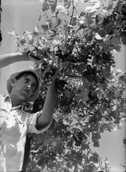 אבוקה - בציר ענבים